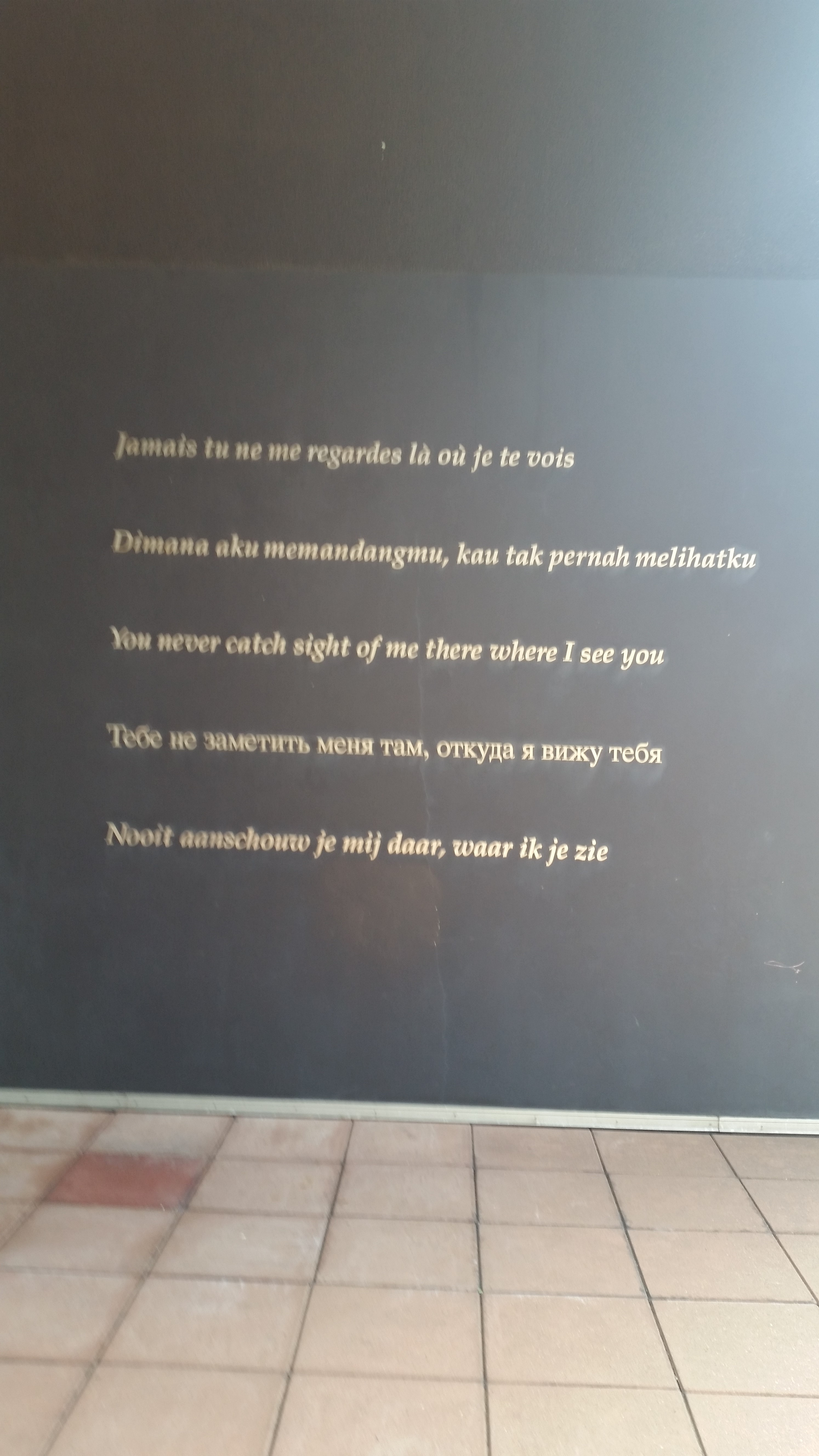 Transit (Claudia Kölgen)